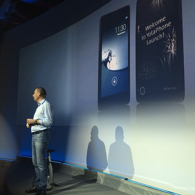 Презентация Йотафона